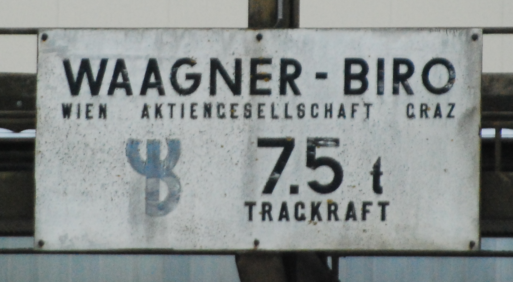 Tafel der Stahlbaufirma Waagner-Biro auf einer Förderanlage der Tullner Zuckerfabrik